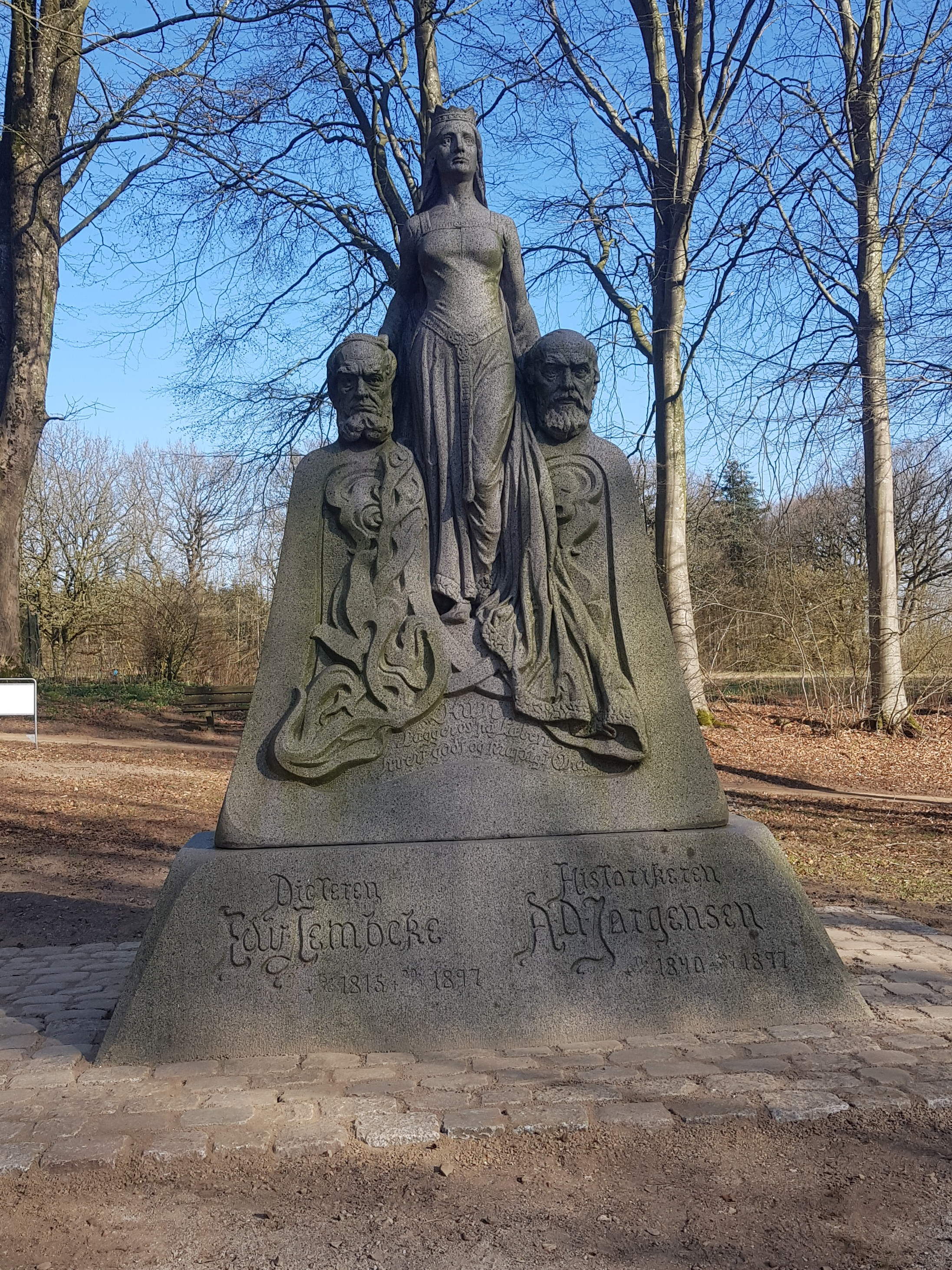 Skibelund Krat - Modersmålet